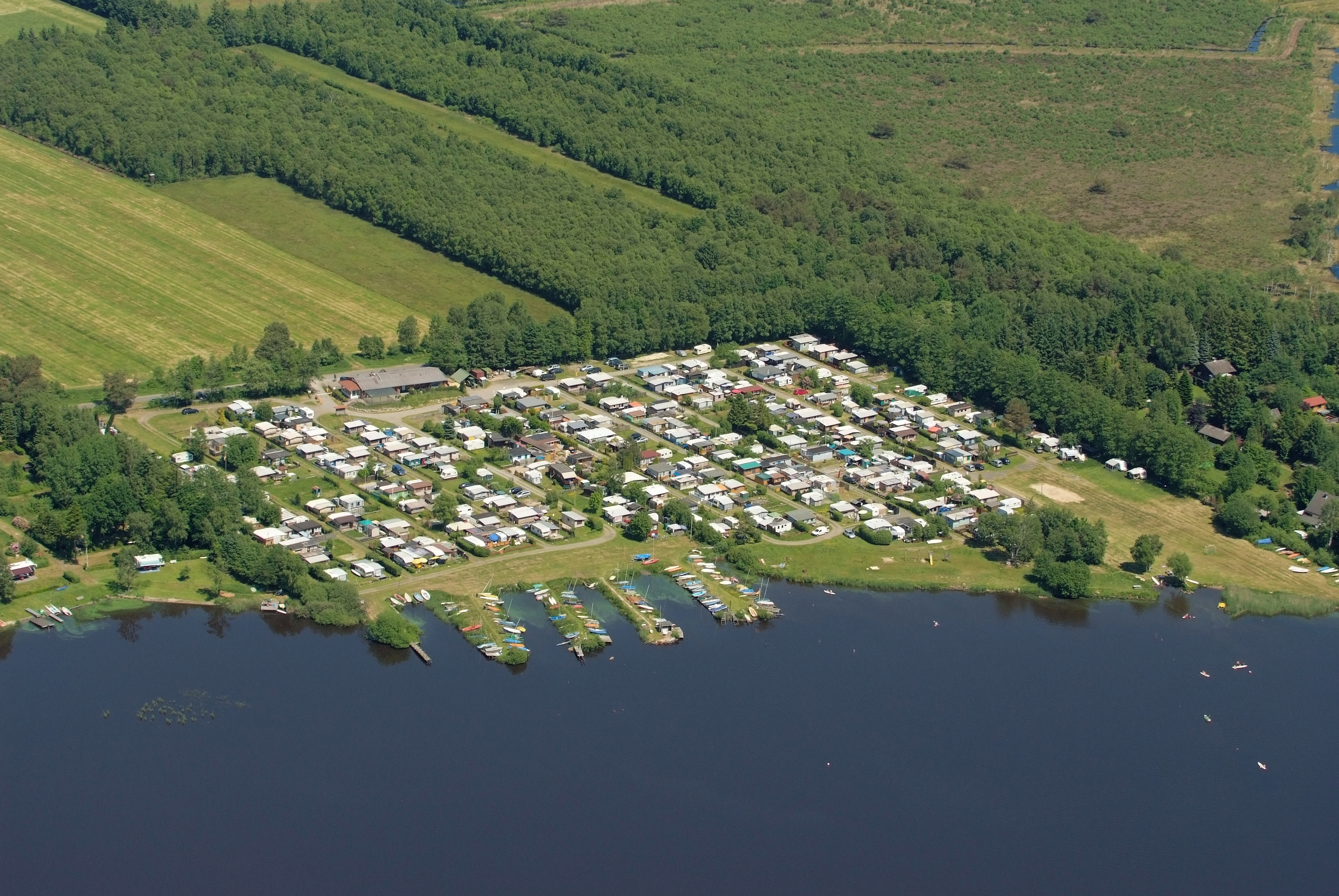 Fotoflug vom Flugplatz Nordholz-Spieka über Cuxhaven und Wilhelmshaven: Campingplatz am Flögelner See